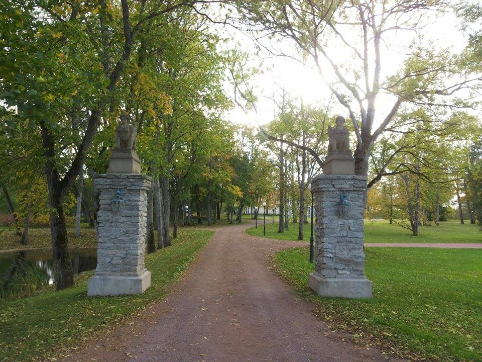 Kõue-Triigi mõisa värav